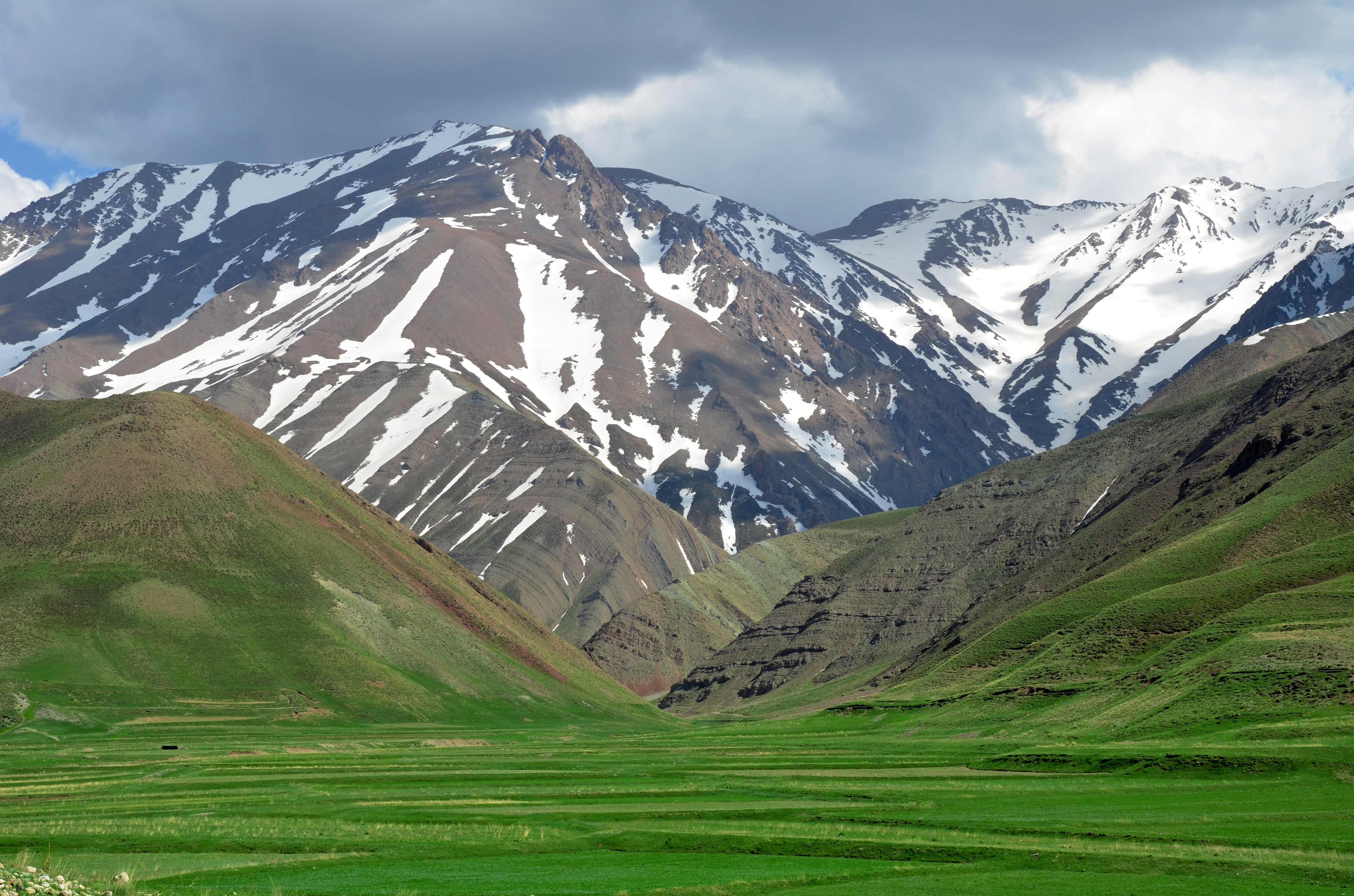 Mazandaran - Lasem road